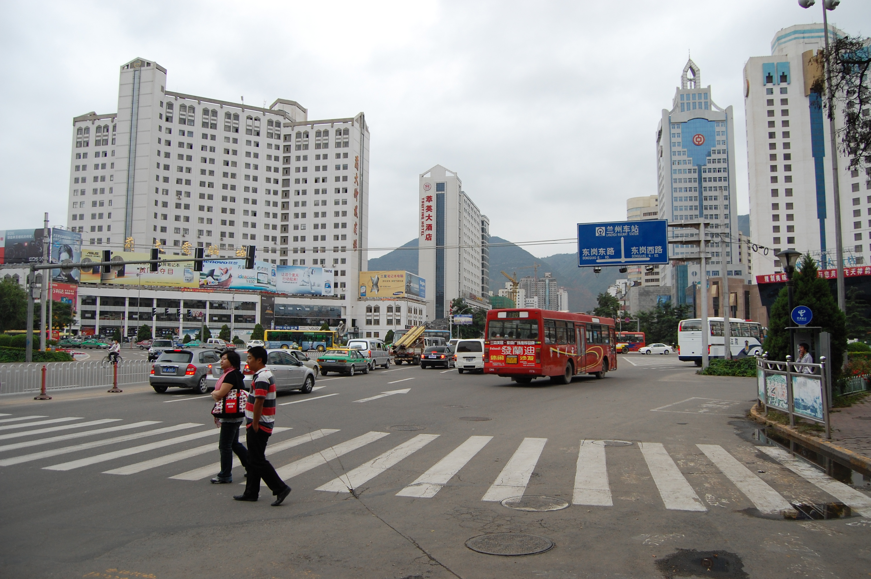 Straßenbild in Lanzhou, Provinz Gansu, China